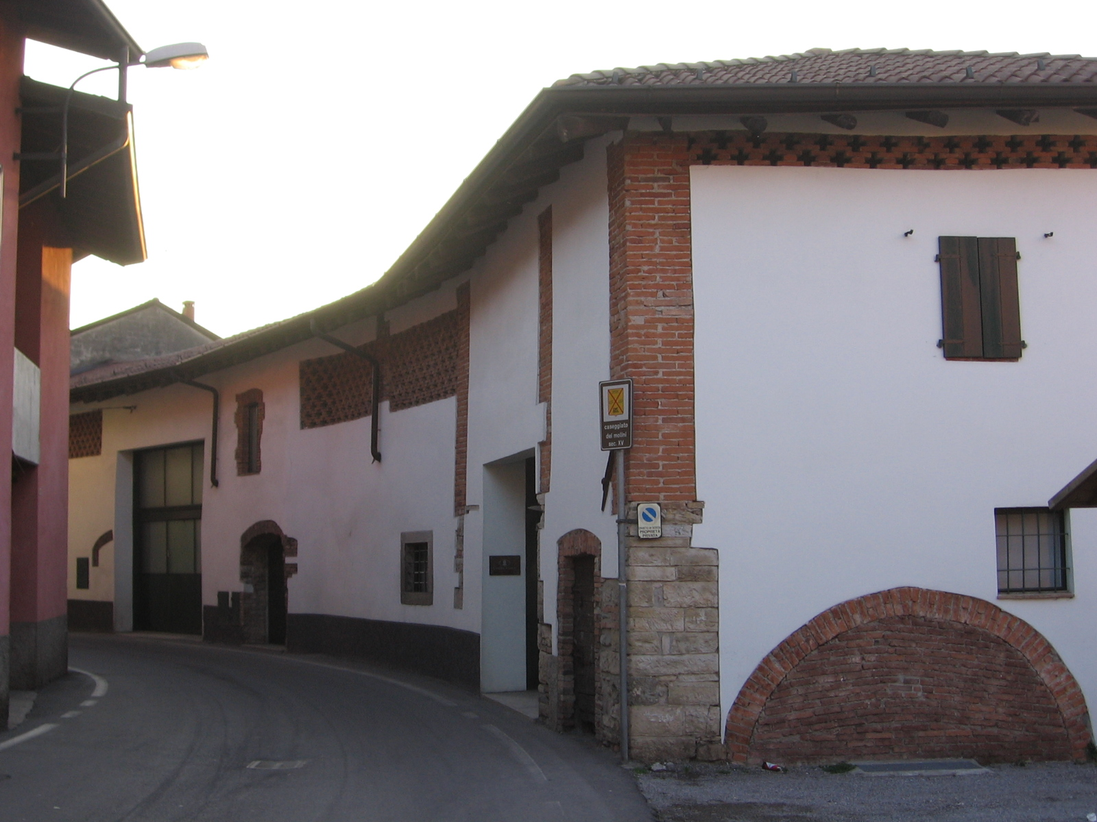 Villa di Serio, Bergamo, Italia